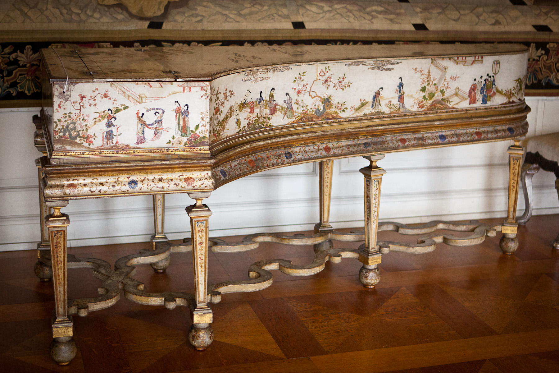 Berlin